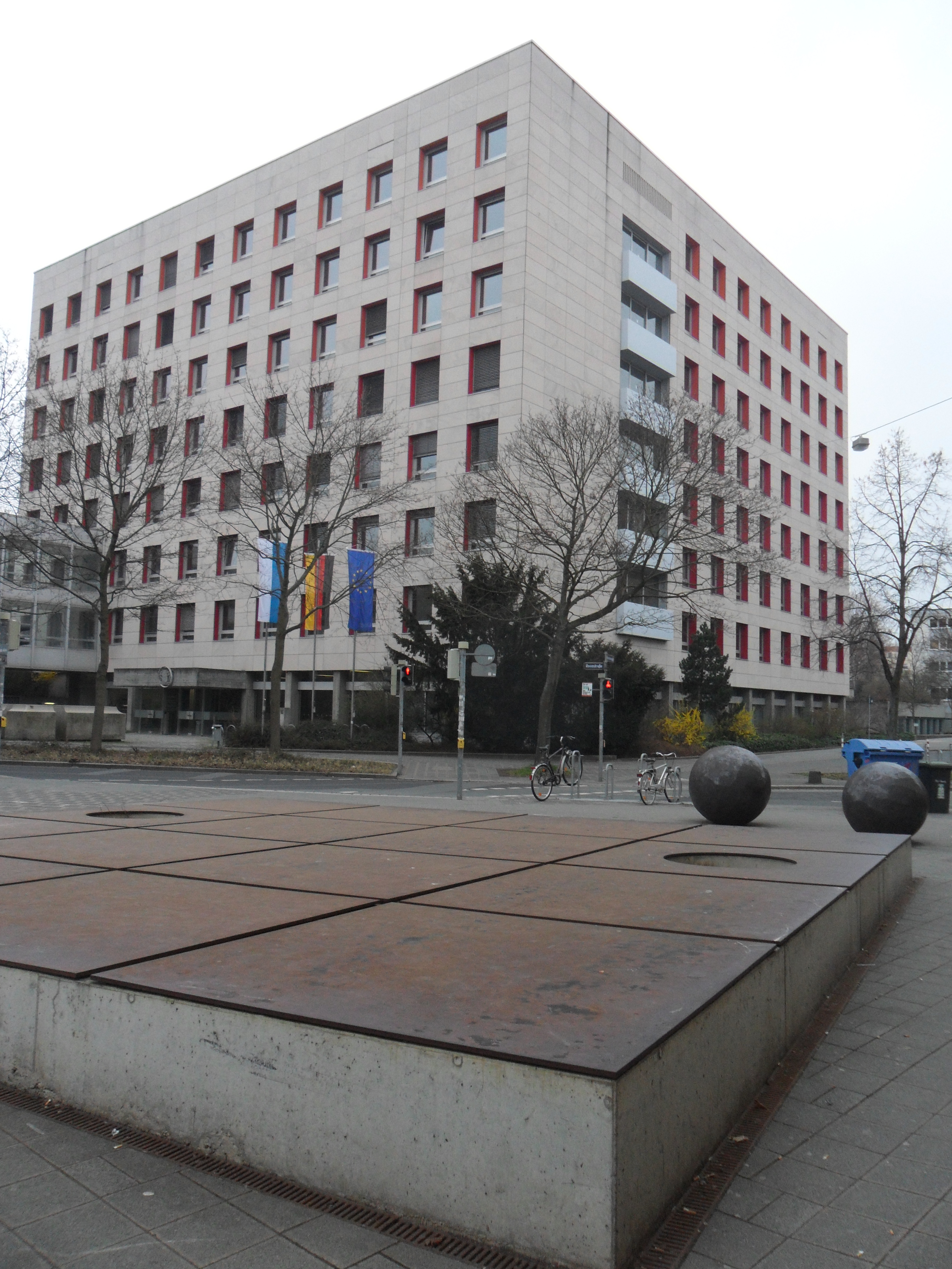 Gebäude des Arbeitsgerichtes Nürnberg an der Roonstraße 20 von der Himpfelshofstraße im Nordosten her gesehen